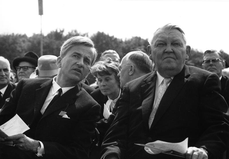 Köln 1965 XII. Deutscher Evangelischer Kirchentag Abschlußkundgebung am 1.8.1965 Im Bild: Bundeskanzler Prof. Dr. Ludwig Erhard (re.) und der Präsident des Deutschen Evangelischen Kirchentages Dr. Richard von Weizsäcker (li.)